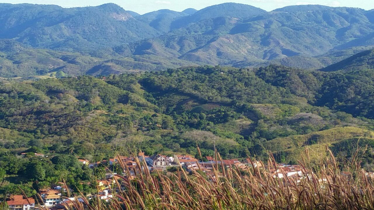 Palmácia